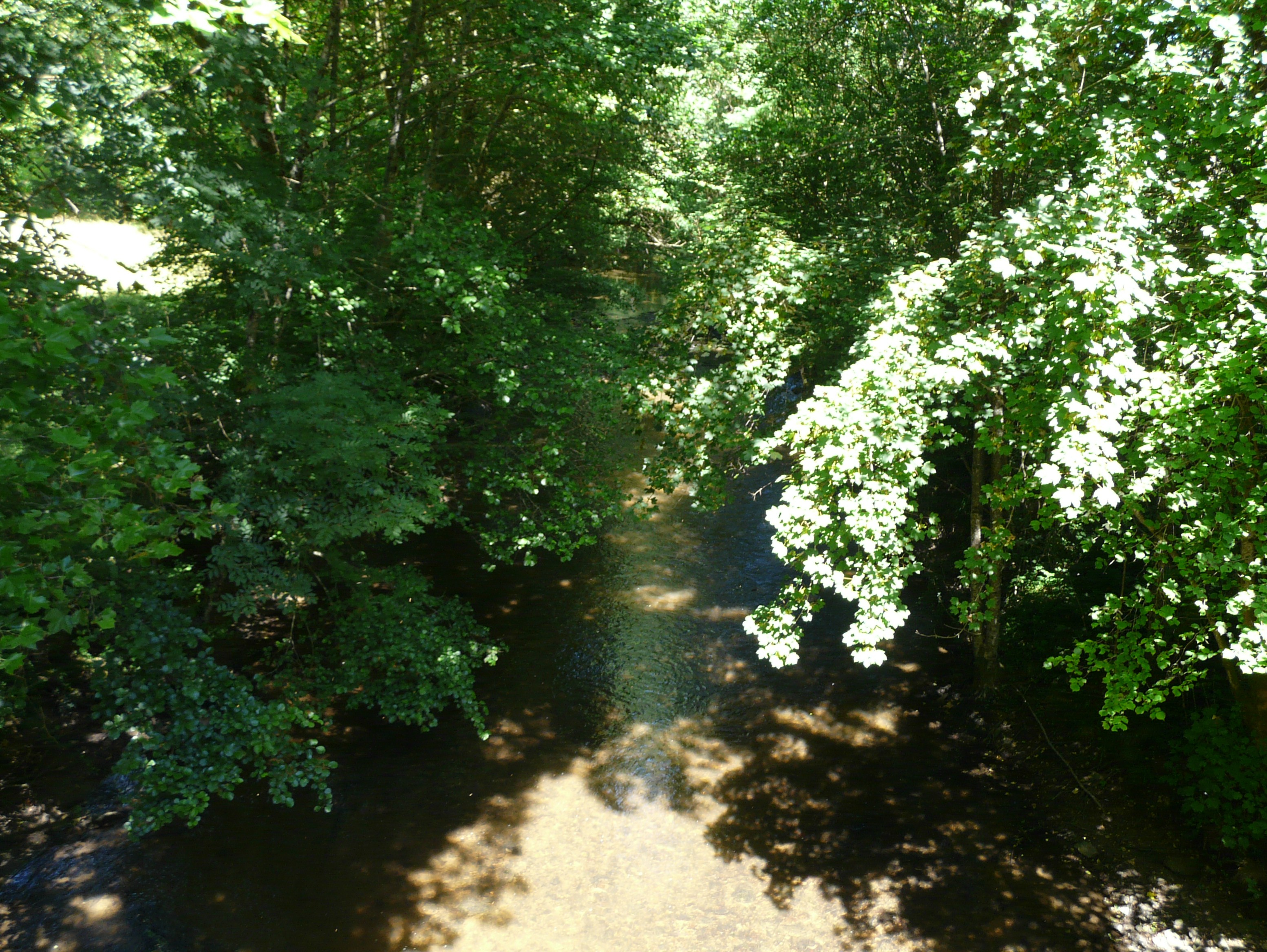 La Boucheuse en amont du pont des routes départementales 6 (Corrèze) et 18 (Haute-Vienne), en limites de Glandon (à gauche) et Saint-Éloy-les-Tuileries (à droite).